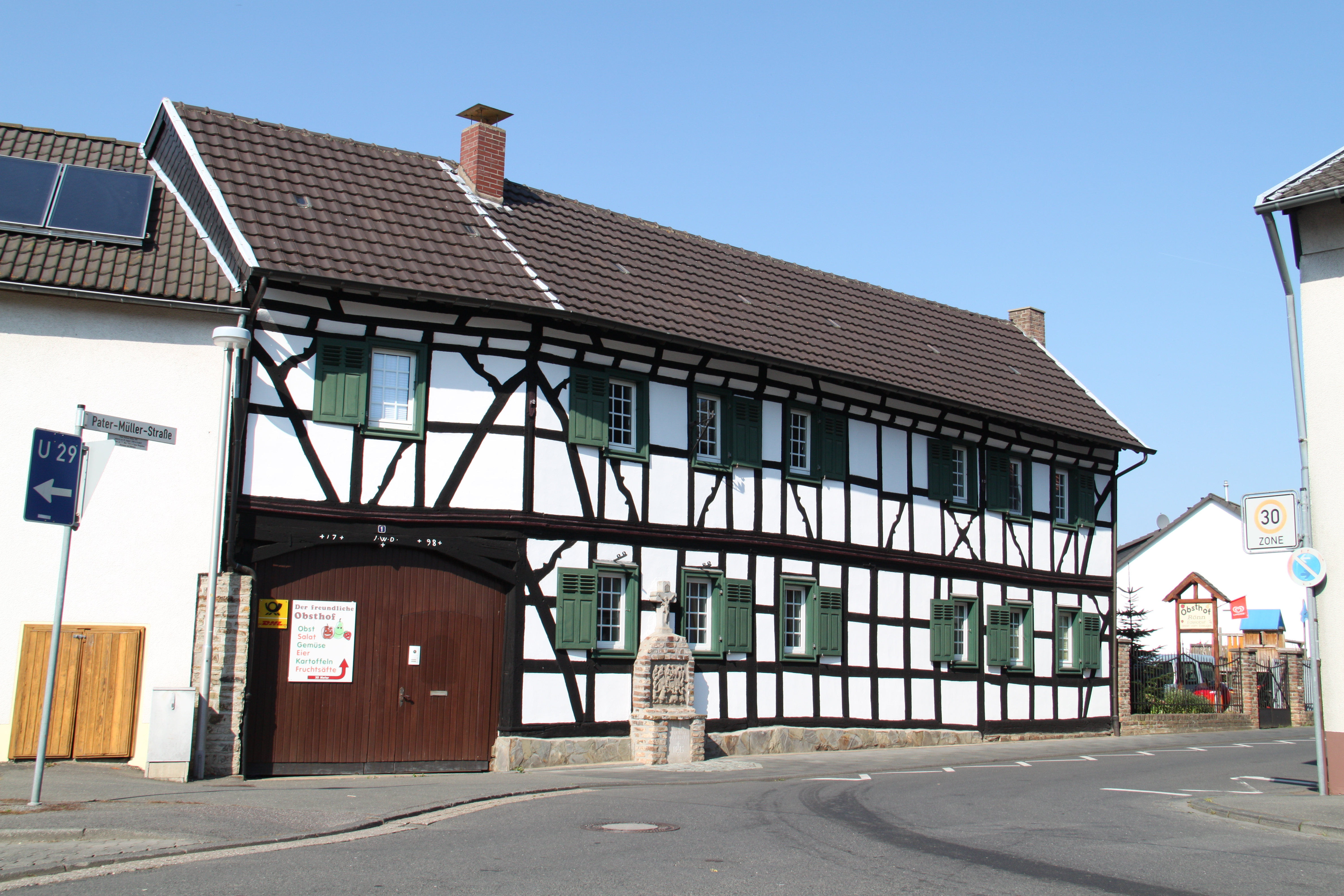 Fachwerkhaus und Kreuzwegstation ("Fußfall"), Meckenheim Ersdorf, Pater-Müller-Straße 1